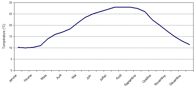 Températures moyennes observées à Tallahassee